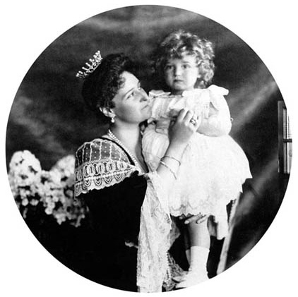 Tsarevich Alexei Nikolaevich